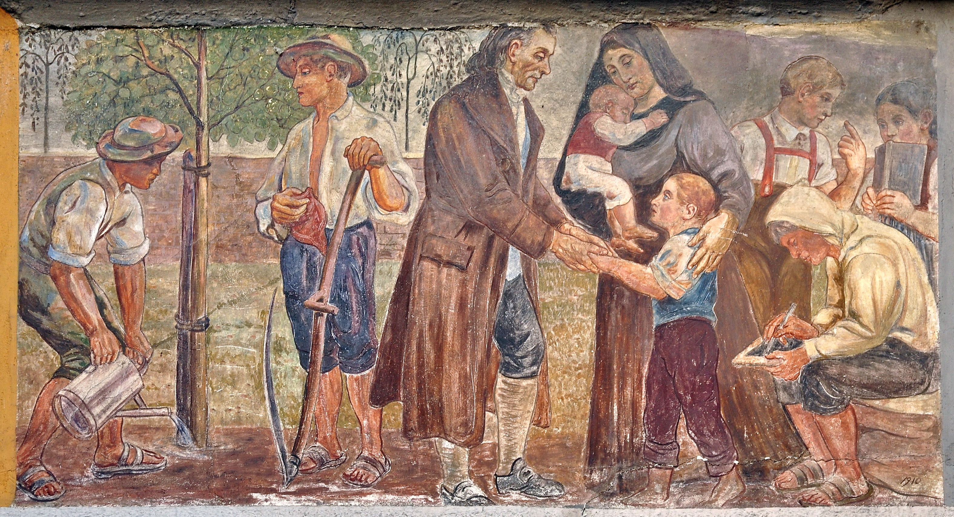 Heinrich Pestalozzi, Marktgasse in Rapperswil (Switzerland)